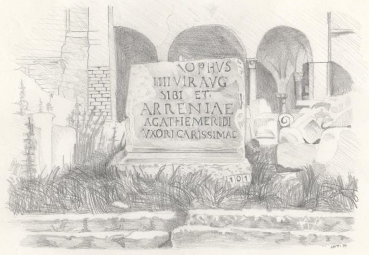 Ara funeraria di Sintrofo e Agatemeride: trovata c/o la Madonnina del Boschetto di Onzato di Castel Mella